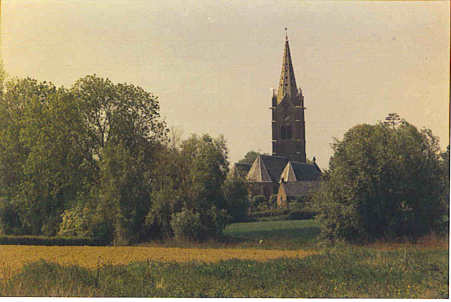 An-2010 à Herzeele. péllicule kodak - argentique foto